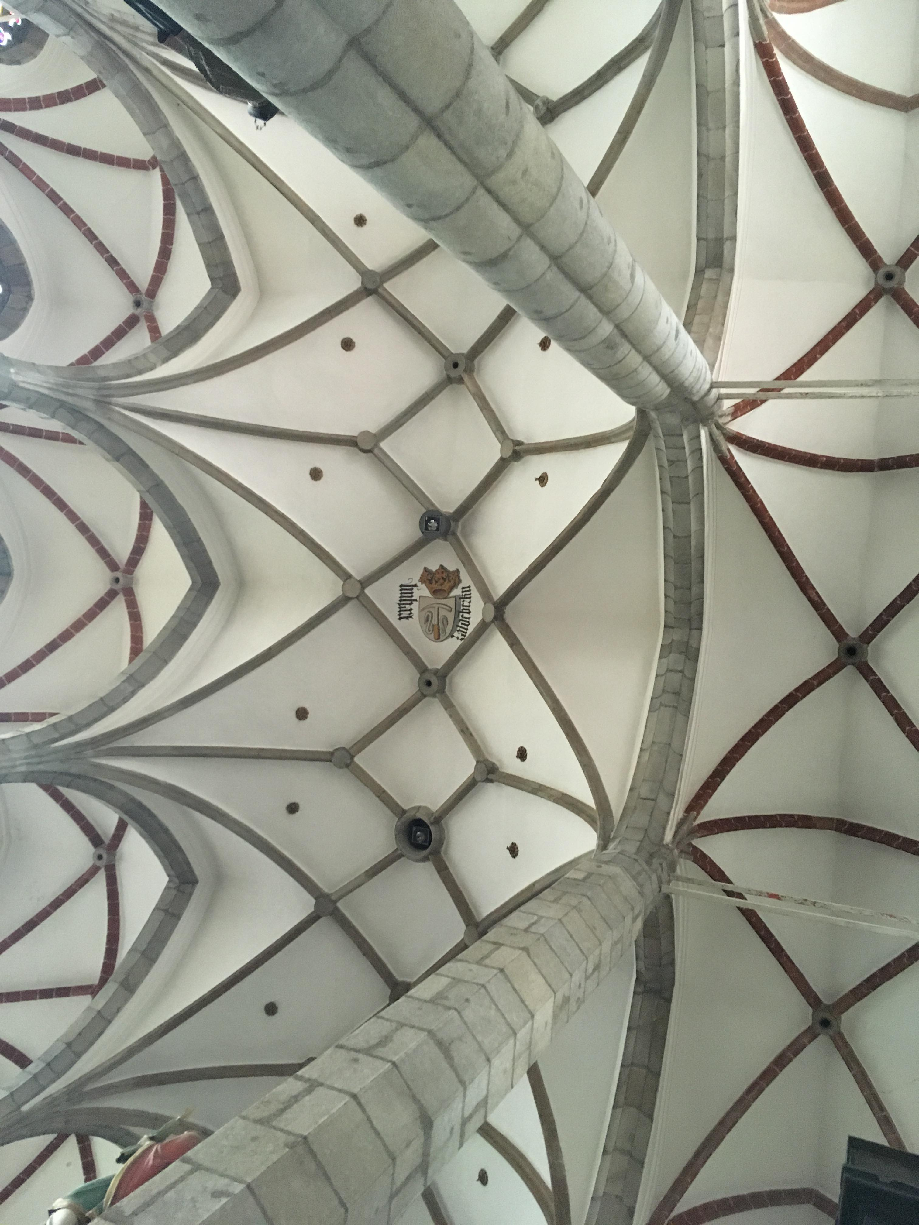 Сітчасте склепіння центрального нефу костела святого Віта в Чеському Крумлові